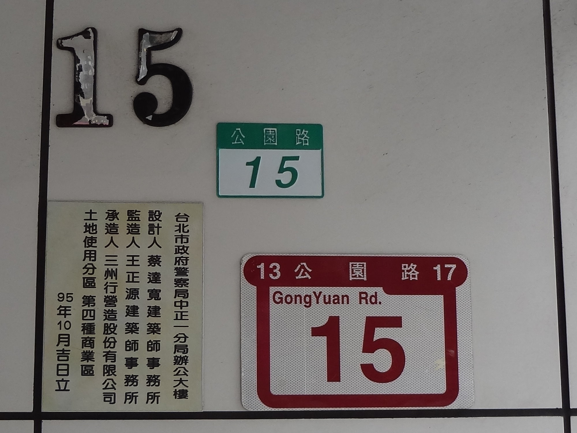 臺北市政府警察局中正第一分局辦公大樓門牌號碼：臺北市中正區公園路15號。